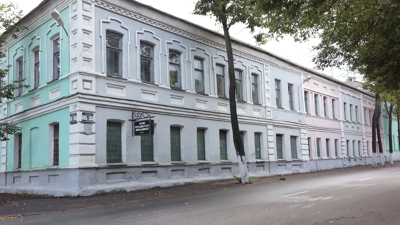 Беларуская (тарашкевіца): Забудова вул. Пакроўскай. г. Віцебск This is a photo of Belarusian heritage monument. Reference number: 213Г000059 ( WLM)